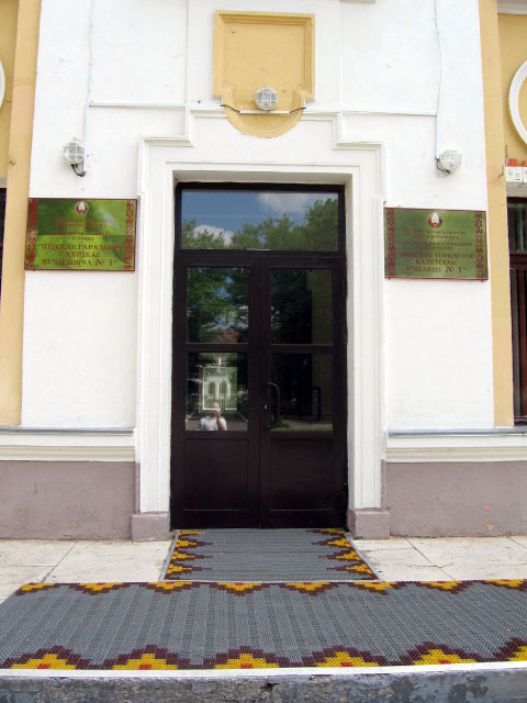 Вход в минское кадетское уч-ще №1